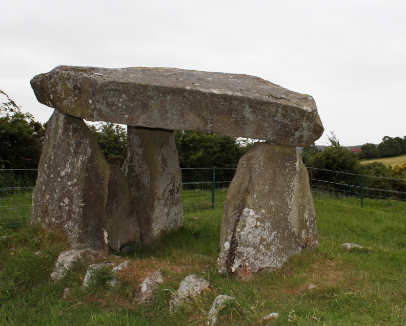 Ballykeel dolmen